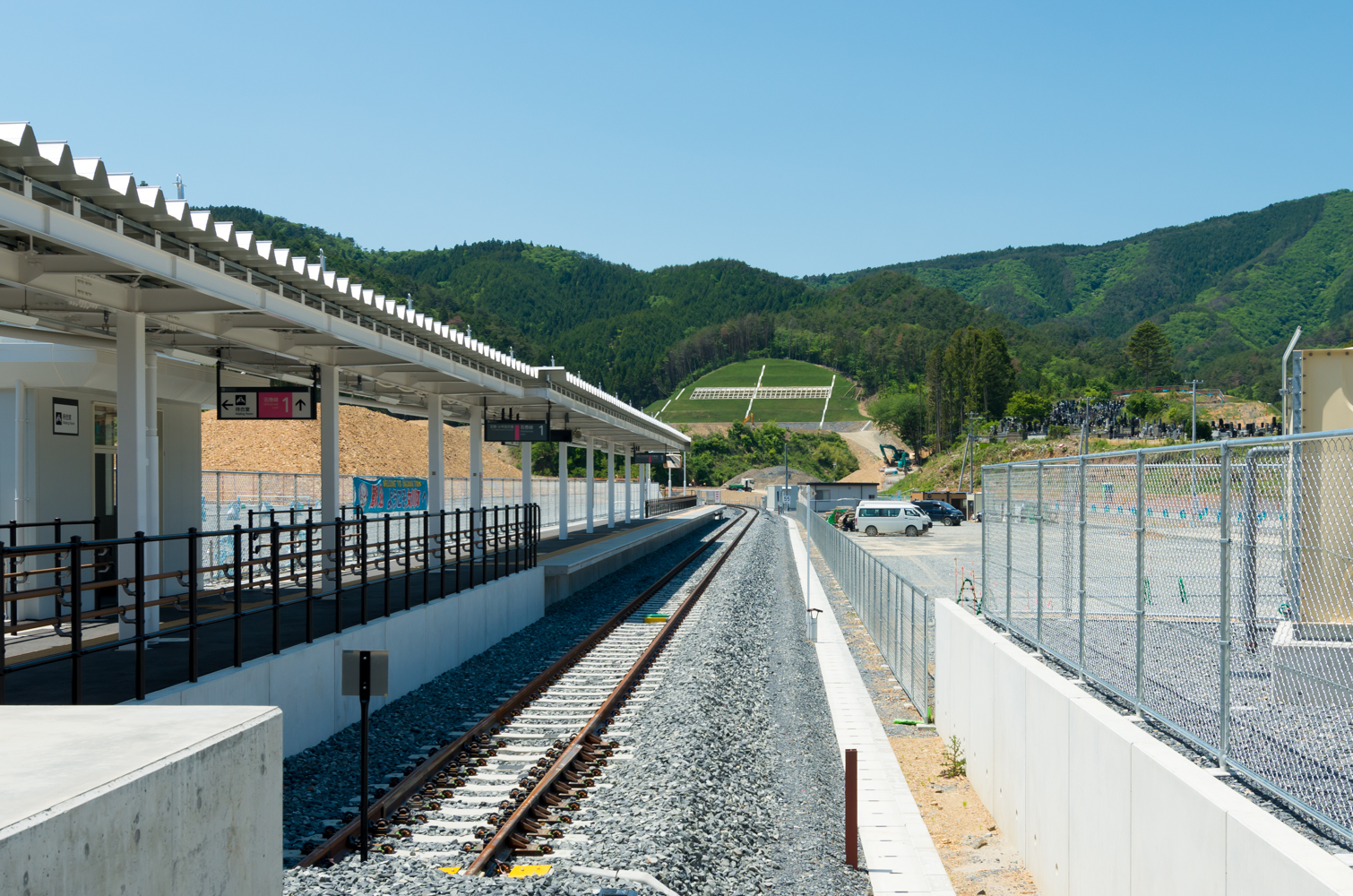 東日本旅客鉄道株式会社石巻線女川駅ホーム